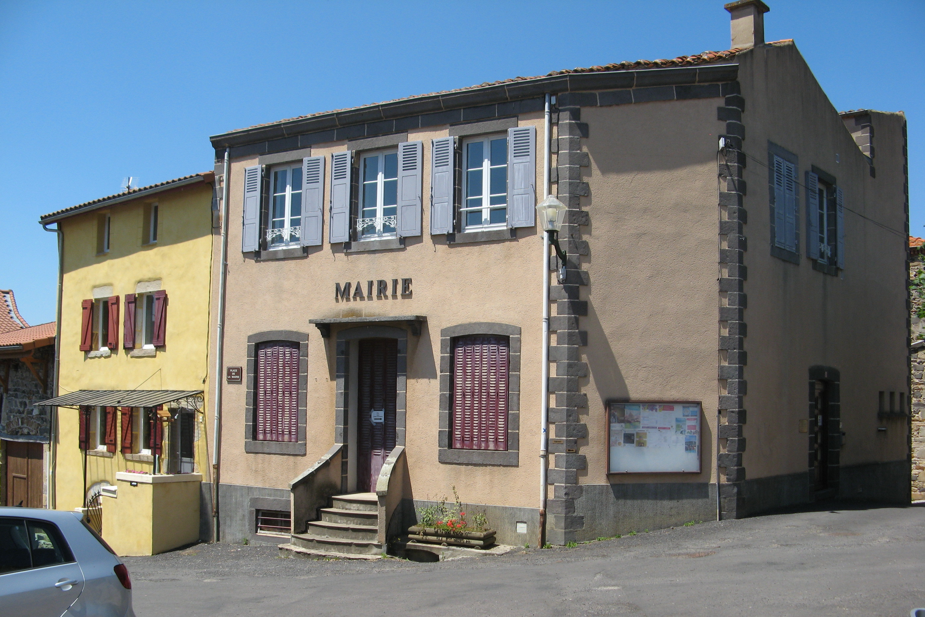 Parent, mairie